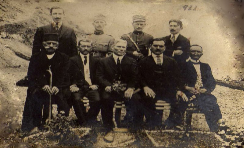 Lidhja e Kombeve dërgoi një komision të përfaqësuesve nga fuqitë e ndryshme në rajon. Në nëntor 1921, Lidhja vendosi që kufijtë e Shqipërisë duhet të jenë të njëjta si ato qe kishin qenë në vitin 1913, me tre ndryshime të vogla që favorizonin Jugosllavinë.